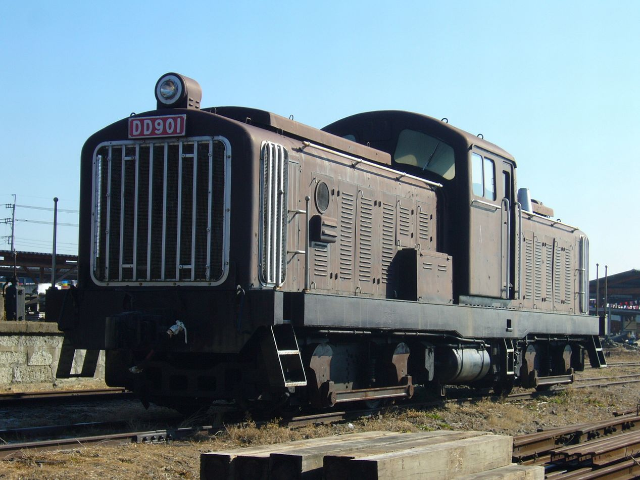 鹿島鉄道 DD901ja:ディーゼル機関車 常陸小川駅構内にて静態保存されていたが、2007年2月27日に解体され現存しない